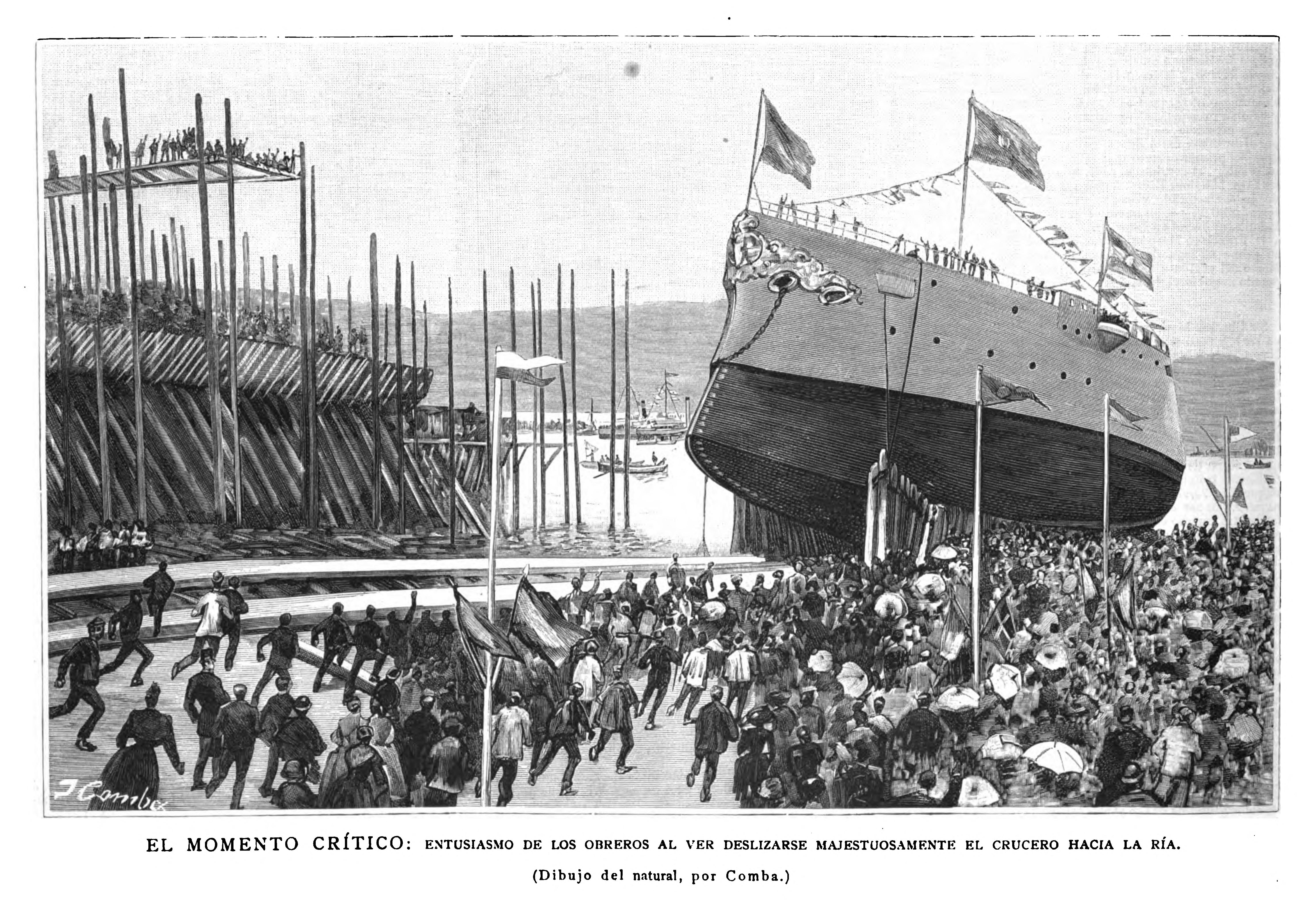 El momento crítico. Entusiasmo de los obreros al ver deslizarse majestuosamente el crucero hacia la ría.